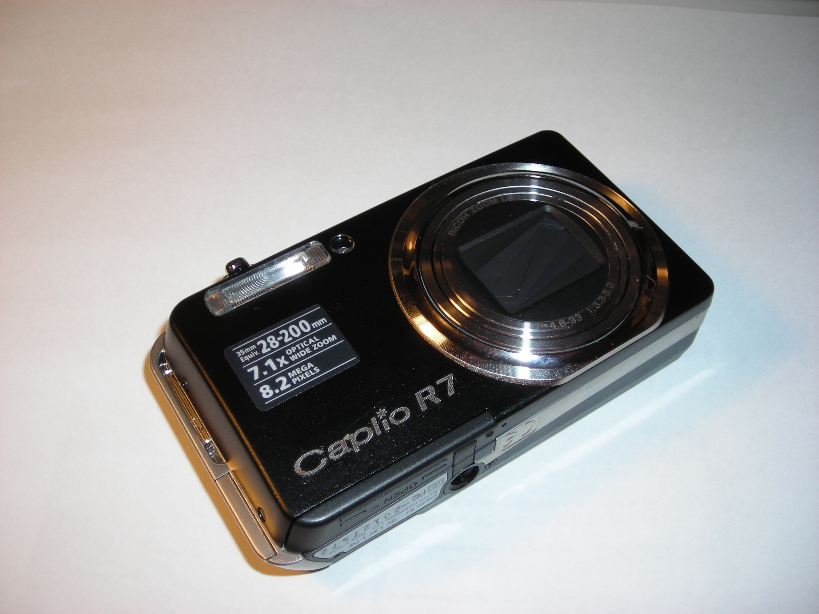 Ricoh Caplio R7